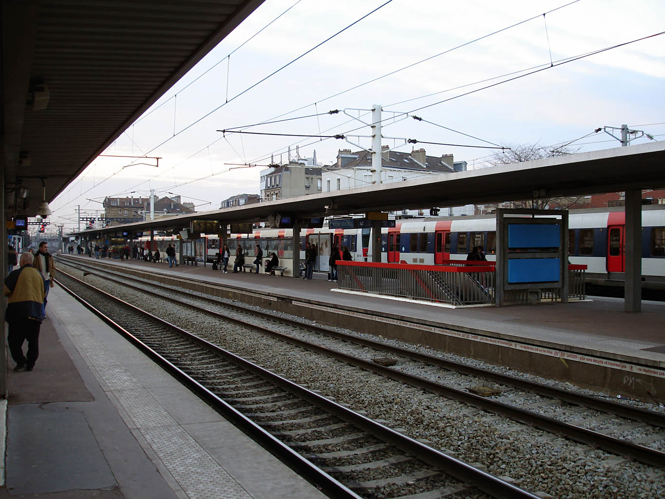 Gare d'Aulnay-sous-Bois (Seine-Saint-Denis)